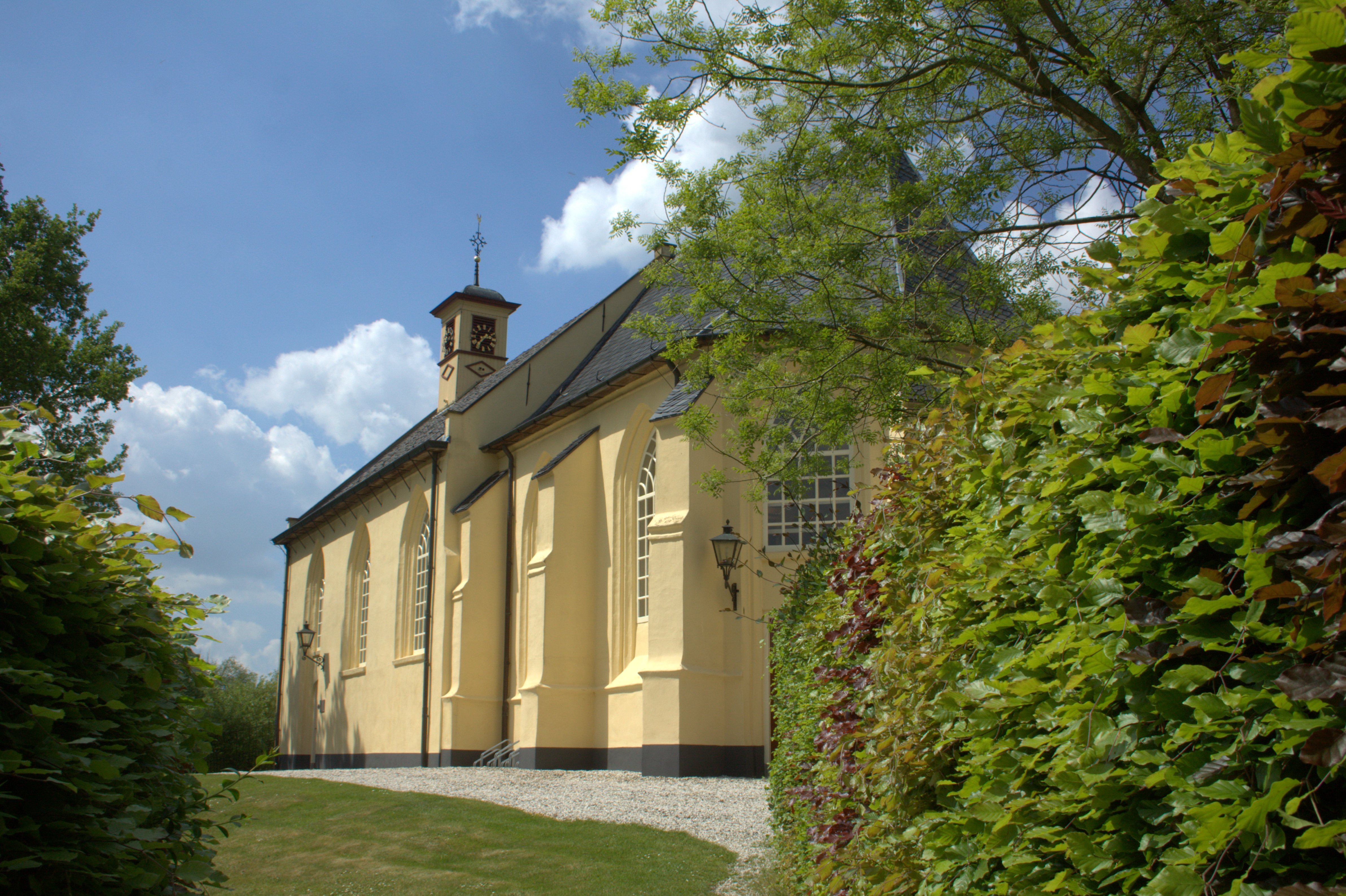 Via het Kerpad in Asch komen we bij de Hervormde kerk.